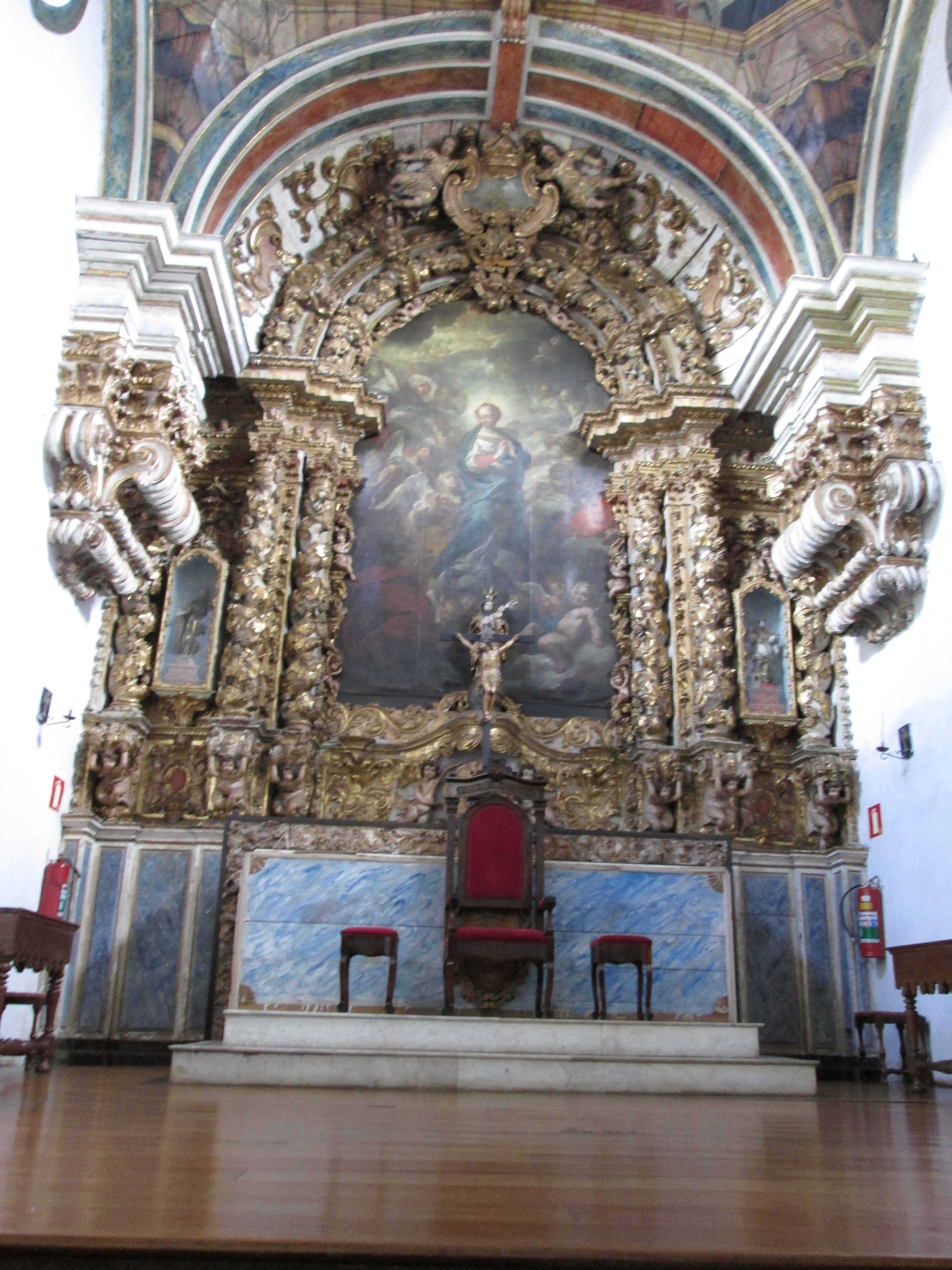 Catedral Basílica Nossa Senhora da Assunção - Mariana, MG